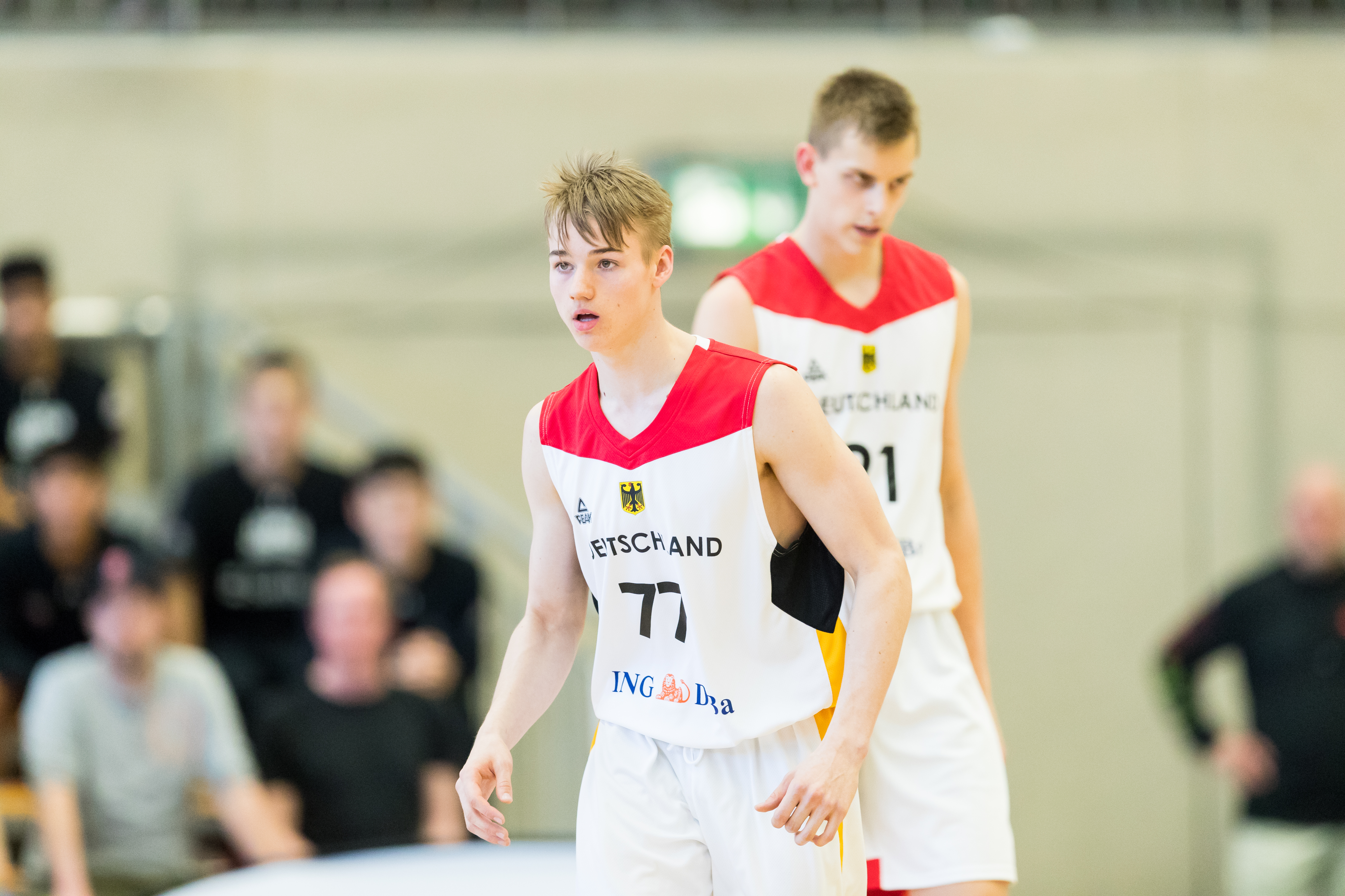 Australia vs Germany 66:88 during final Basketball Albert Schweitzer Turnier at GBG Halle, Mannheim, Baden-Württemberg, Germany on 2018-04-07, Photo: Sven Mandel